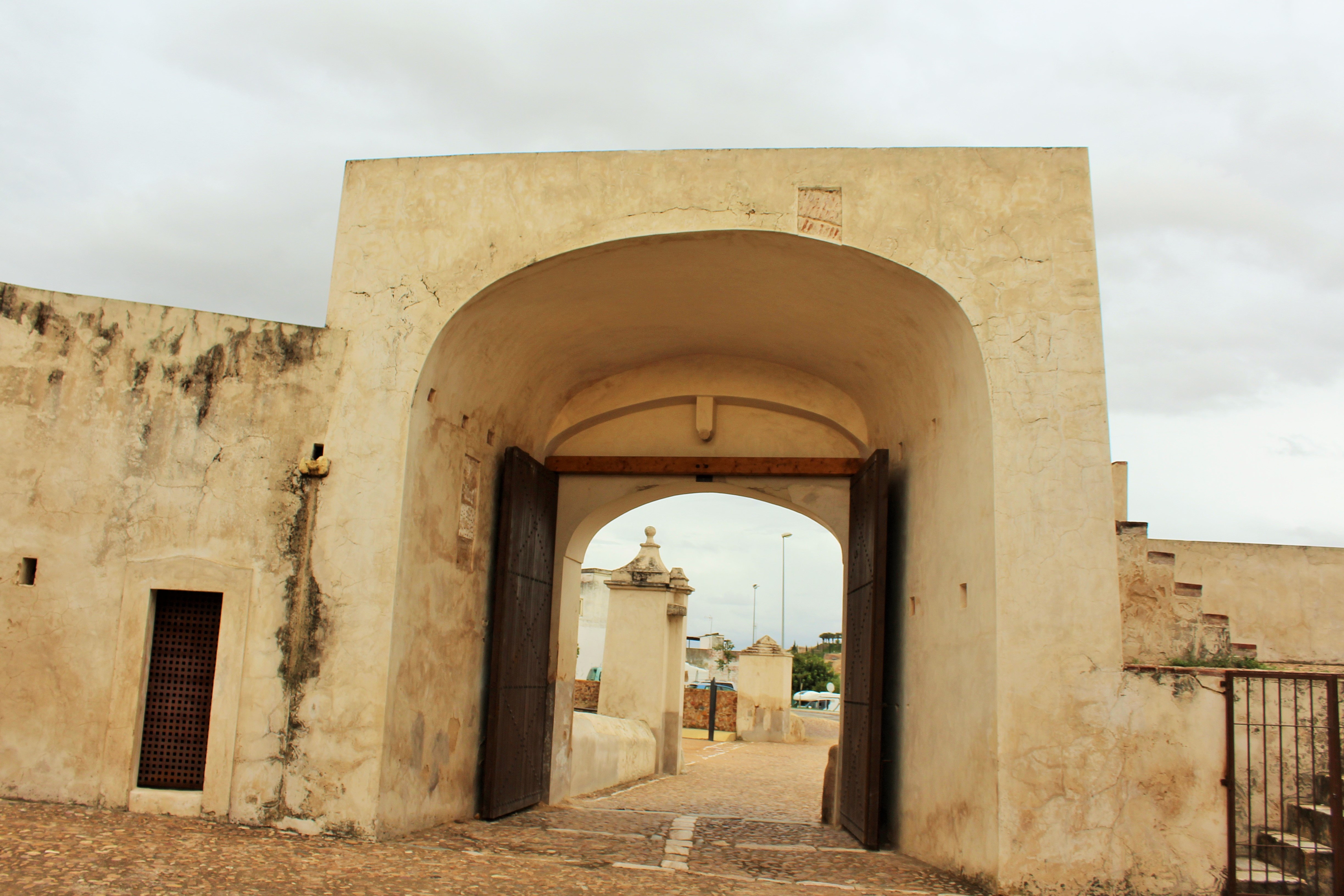 Fachada interior, a occidente.